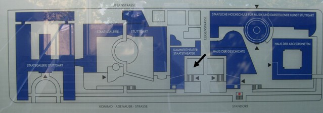 Stuttgart, Unterführung zwischen Neuer Staatsgalerie und dem Großen Haus des Staatstheaters, Hinweistafel mit dem Lageplan der Gebäude an der Ostseite der „Kulturmeile“, Ausschnitt